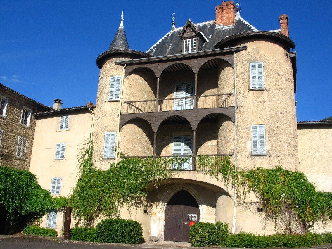 Façade logis abbatial du Moutier à Thiers, Puy de Dôme. Vestige d’une ancienne abbaye bénédictine fortifiée commandée de Cluny, Saône et Loire, la constitution du domaine, bâti en ville basse au débouché ouest des gorges de la Durolle et comprenant un jardin, s’étale sur plusieurs siècles: les parties les plus vieilles remontent au XIe, le mobilier étant daté lui du XVIIIe. Sur le côté, église romane Saint-Symphorien.